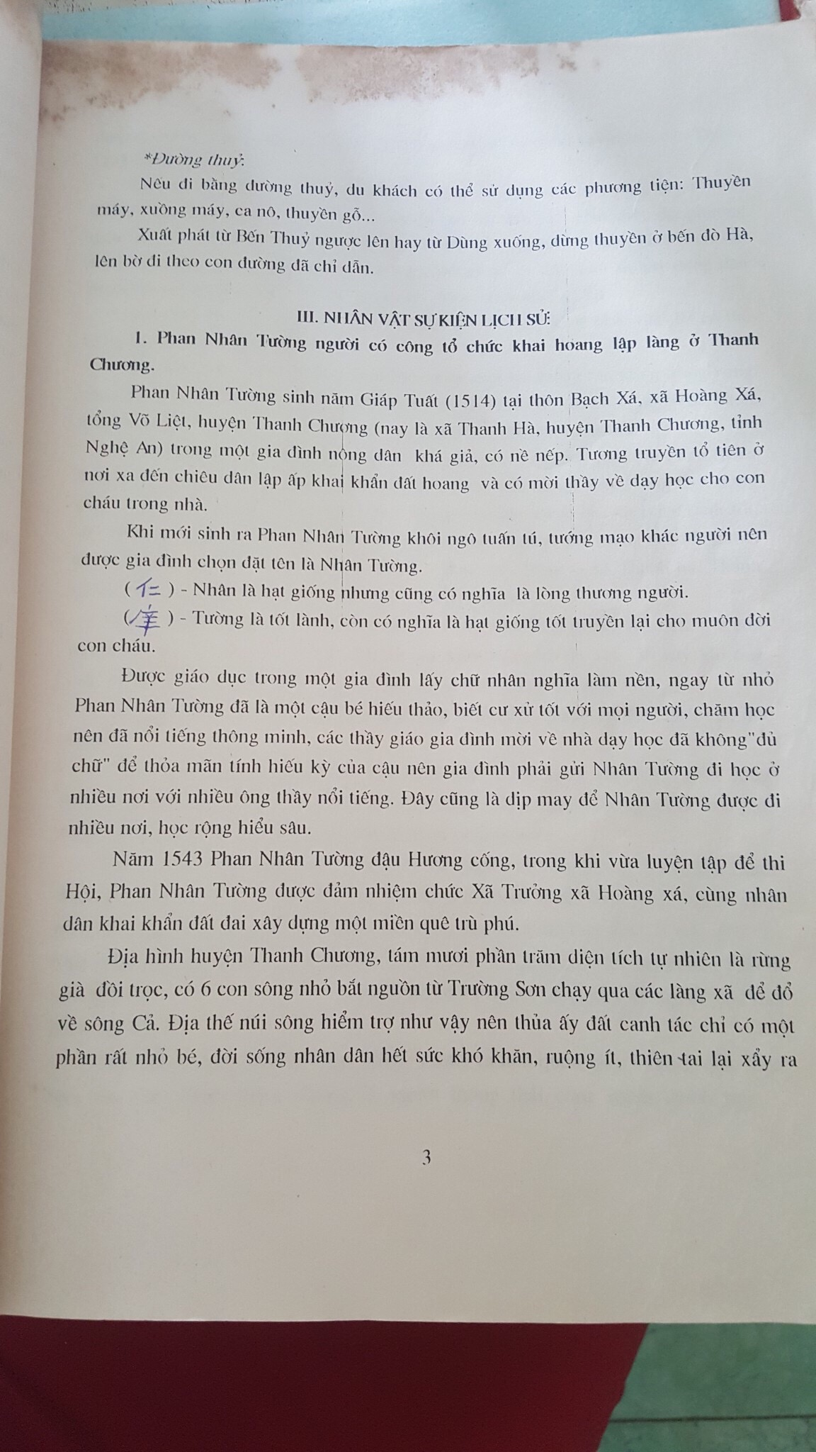 Hồ sơ lưu giữ tại Ban quản lý di tích Nghệ An - Sở Văn hóa TT